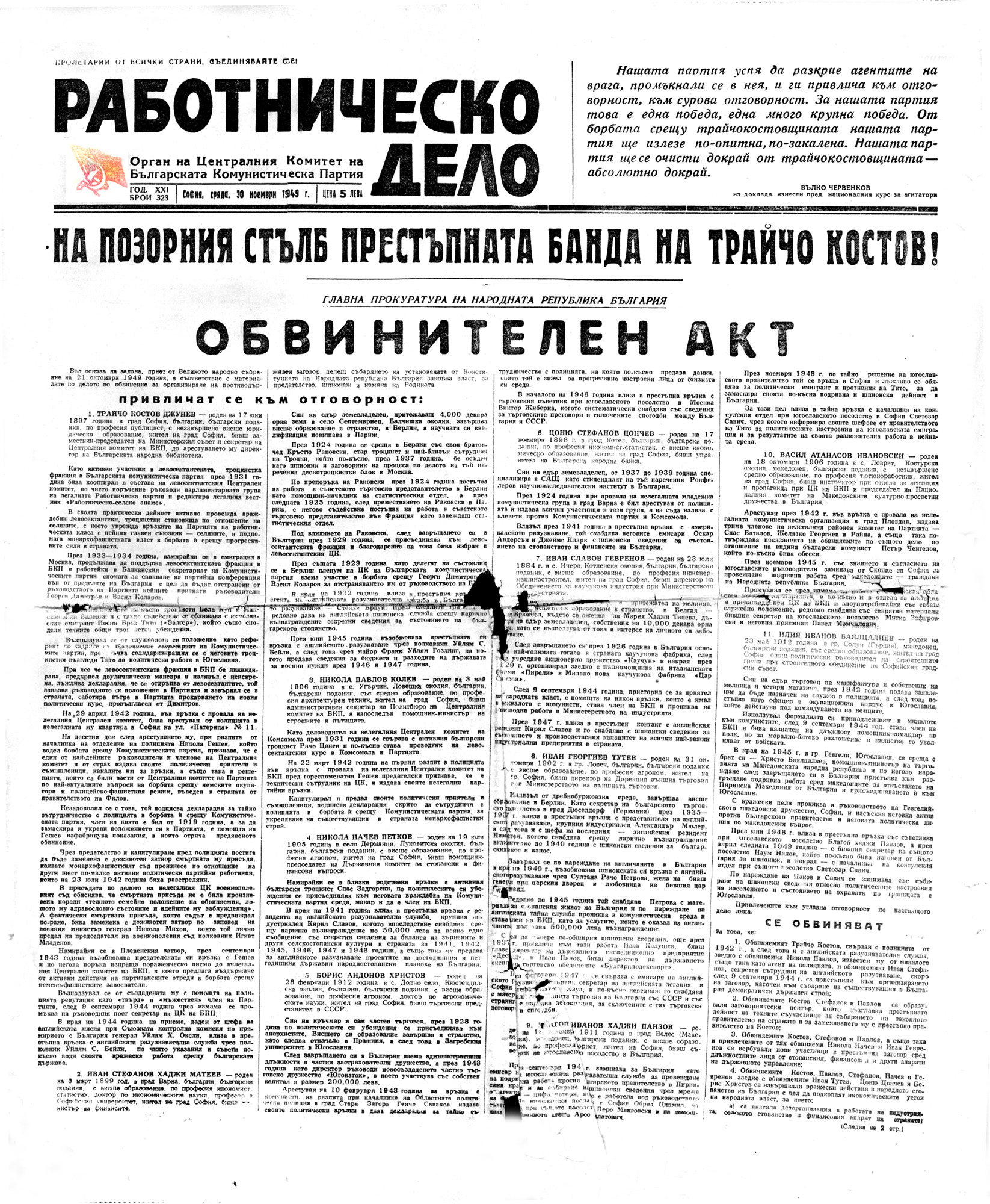 Работническо дело с обвинителния акт срещу групата на Трайчо Костов